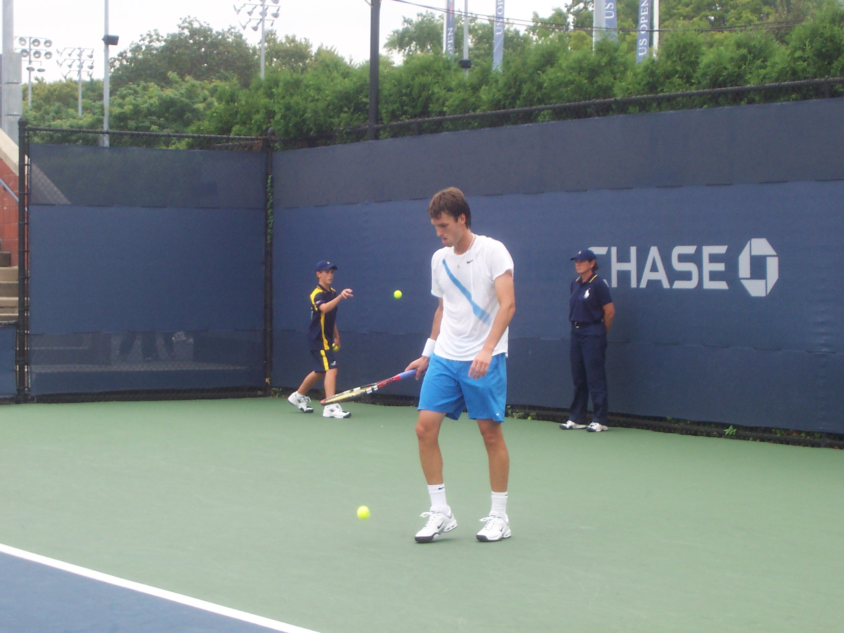 Sam Warburg At The 2007 US Open